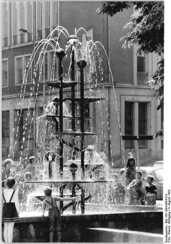 Chemnitz, Springbrunnen ADN-ZB Thieme 4.8.84 Karl-Marx-Stadt: Brunnen - Der Klapperbrunnen am Karl-Marx-Städter Busbahnhof wirkt besonders auf Kinder anziehend. Bei dieser Konstruktion ergießt sich das Wasser von oben herab auf große Schalen, die dann unter dieser Last umkippen und sich mit klapperndem Geräusch wieder entleeren. ( Siehe auch Fotos 11-14 N sowie ADn-Meldung vom 3.8.84 )